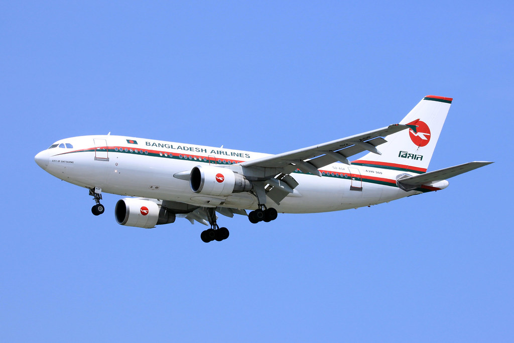 A310 Landing Singapur